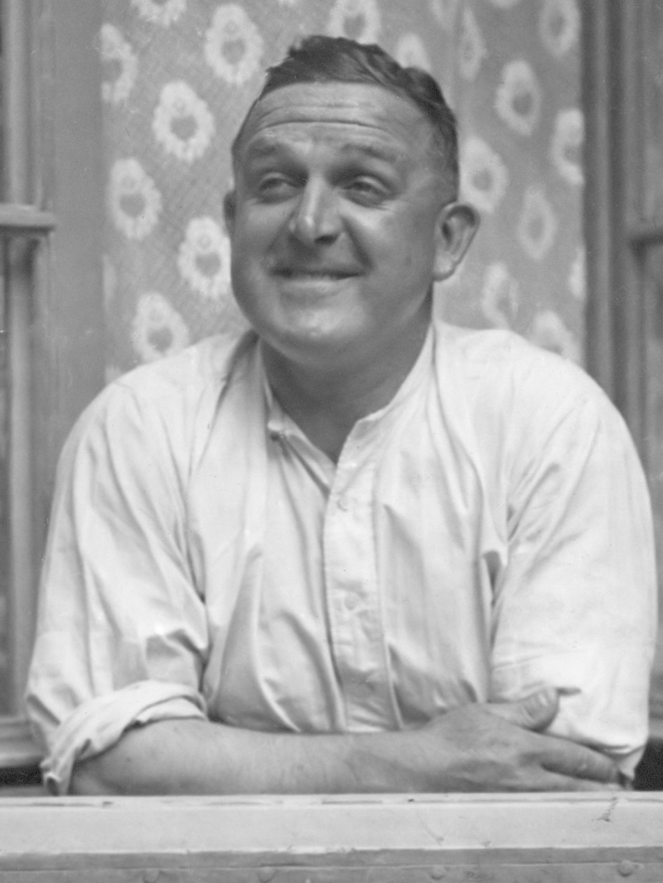 Oefenmeester Bob Glendenning in het hotel Atlantic te Stockholm. Zweden - Nederland (6-2), gespeeld op 9 juni 1929 in het Stadion te Stockholm. 9 juni 1929